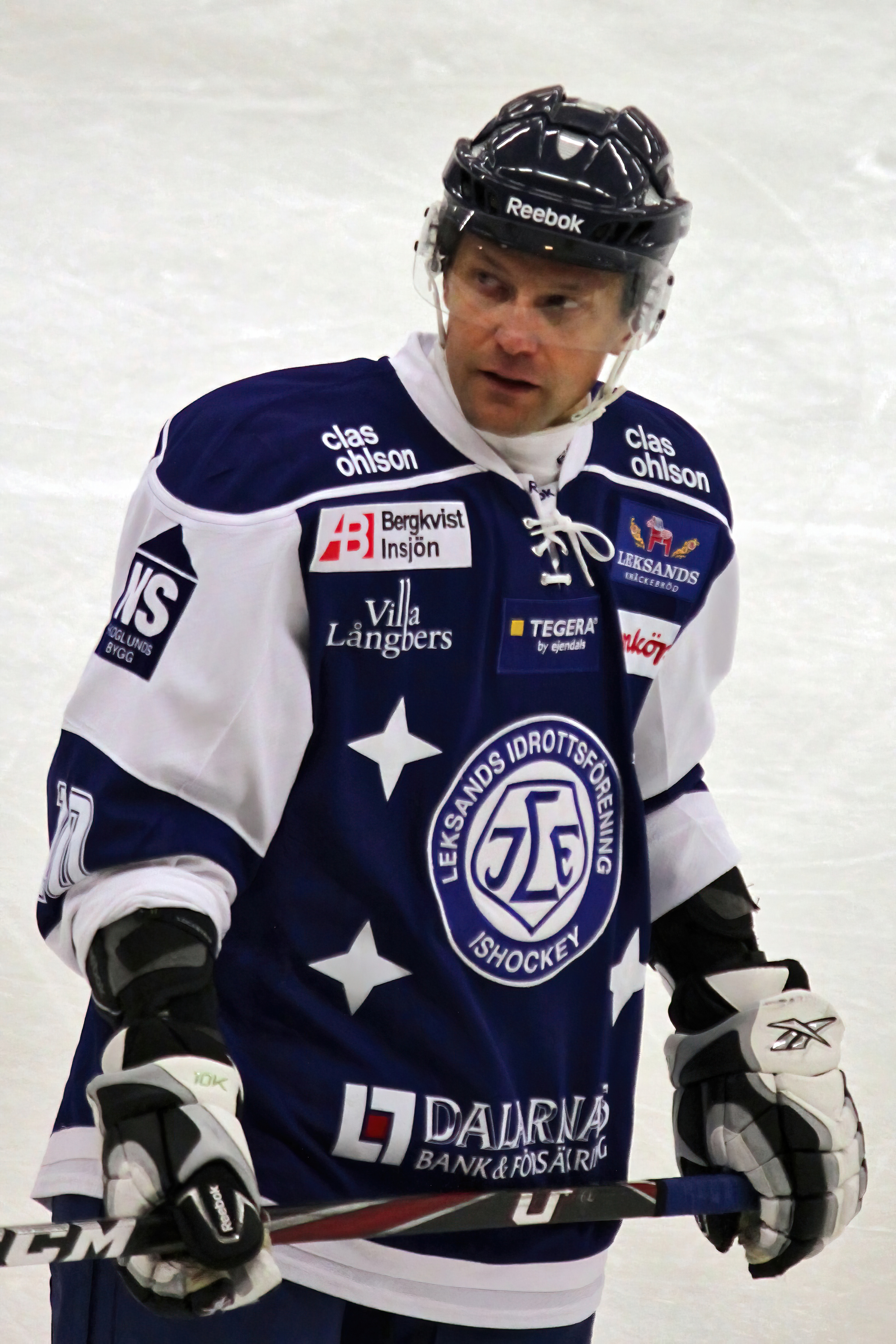 Pelle Prestberg. Träningsmatch mellan Leksands IF och Bofors IK, Bolidenhallen, Hedemora